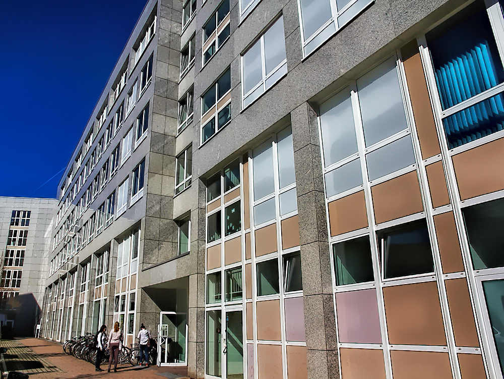 Gebäude der CampusBibliothek I